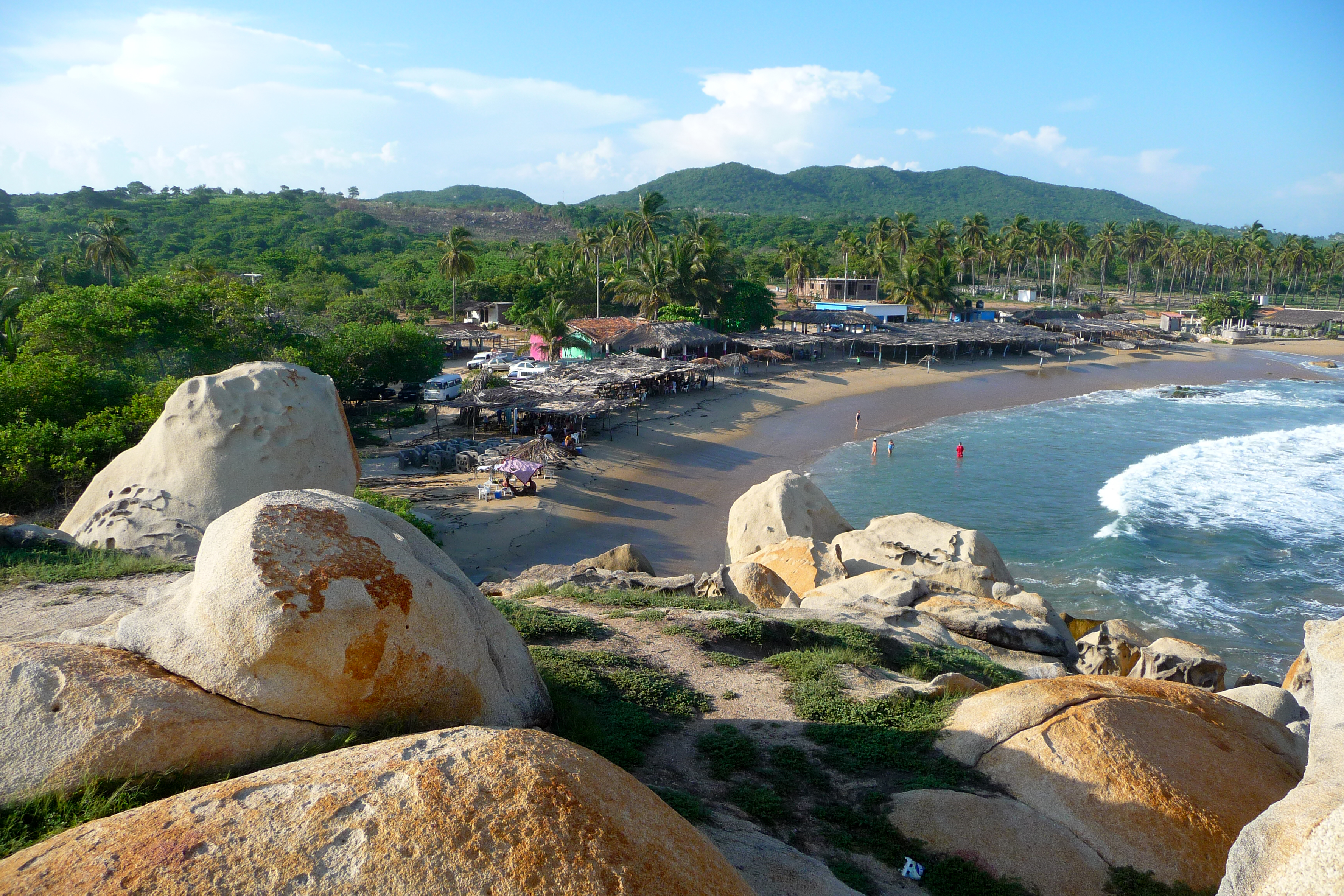 Playa Ventura en el municipio de Copala, Guerrero, México.